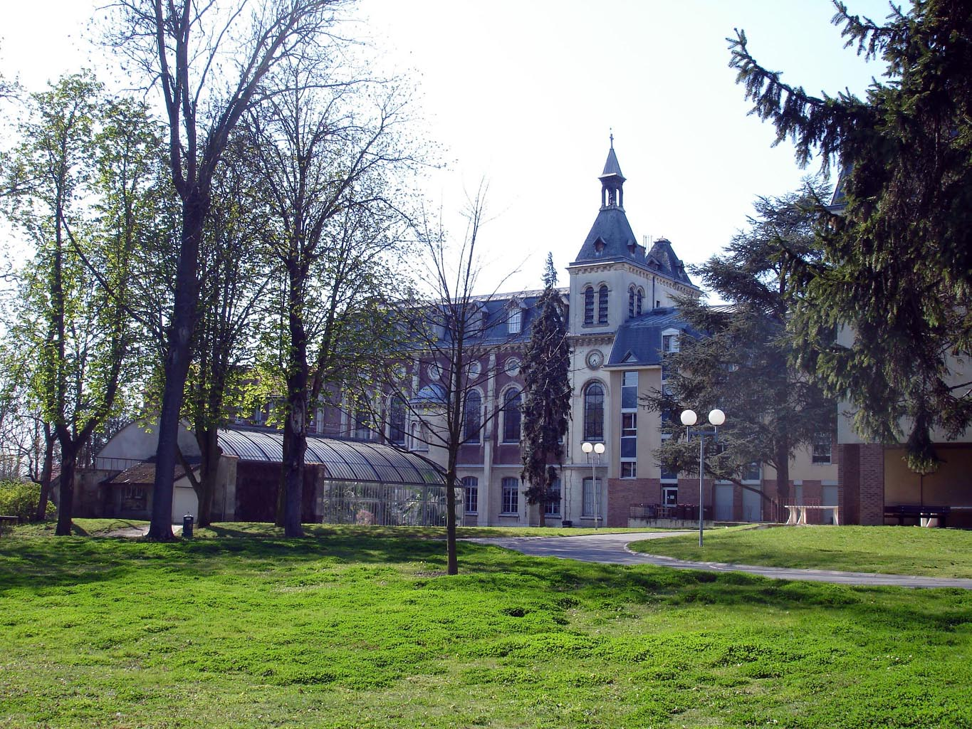 Le château, actuel établissement hospitalier Sainte-Marie, à Villepinte (Seine-Saint-Denis), France